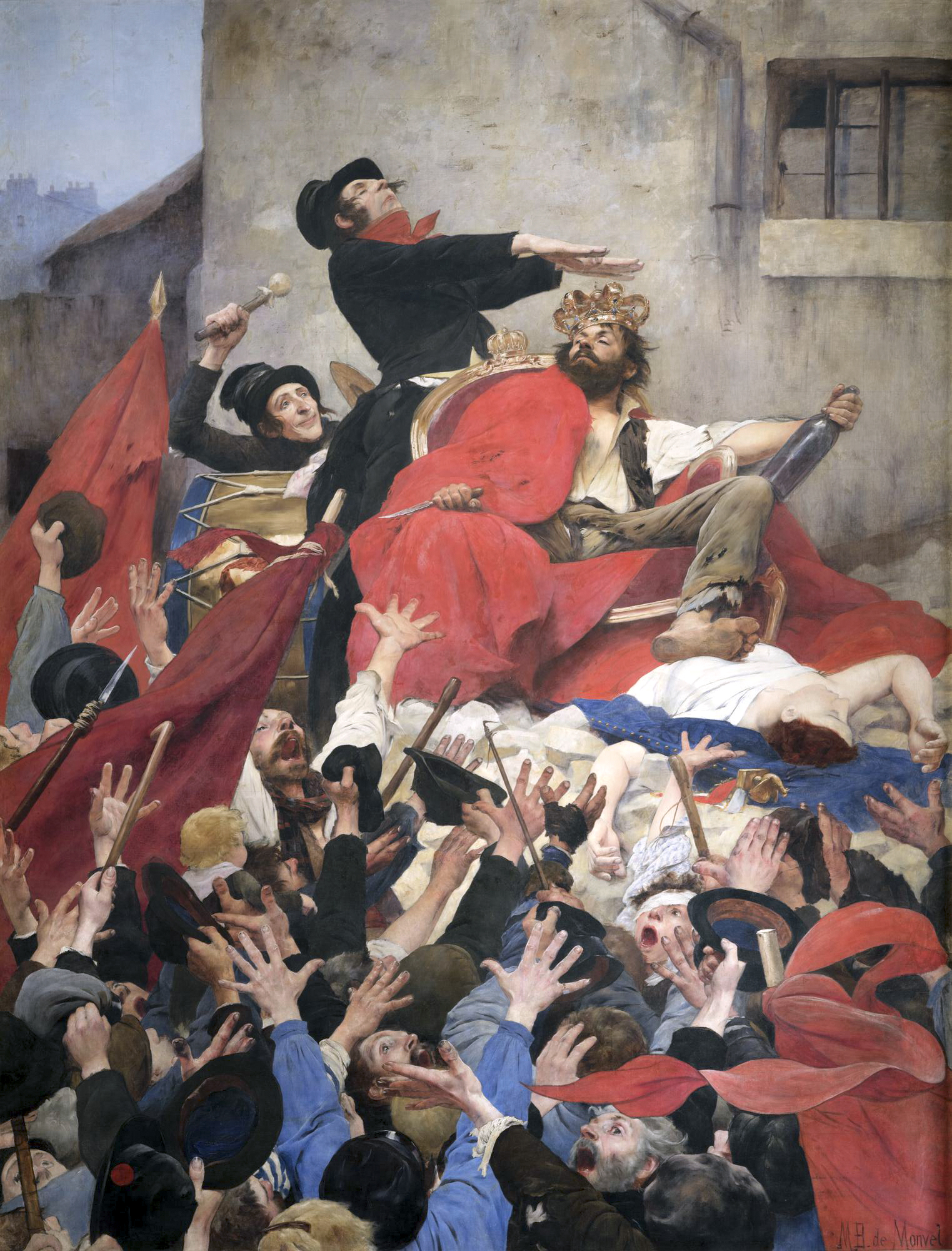 Apothéose, h/t, 430 x 332 cm, Musée des Beaux-Arts d'Orléans.